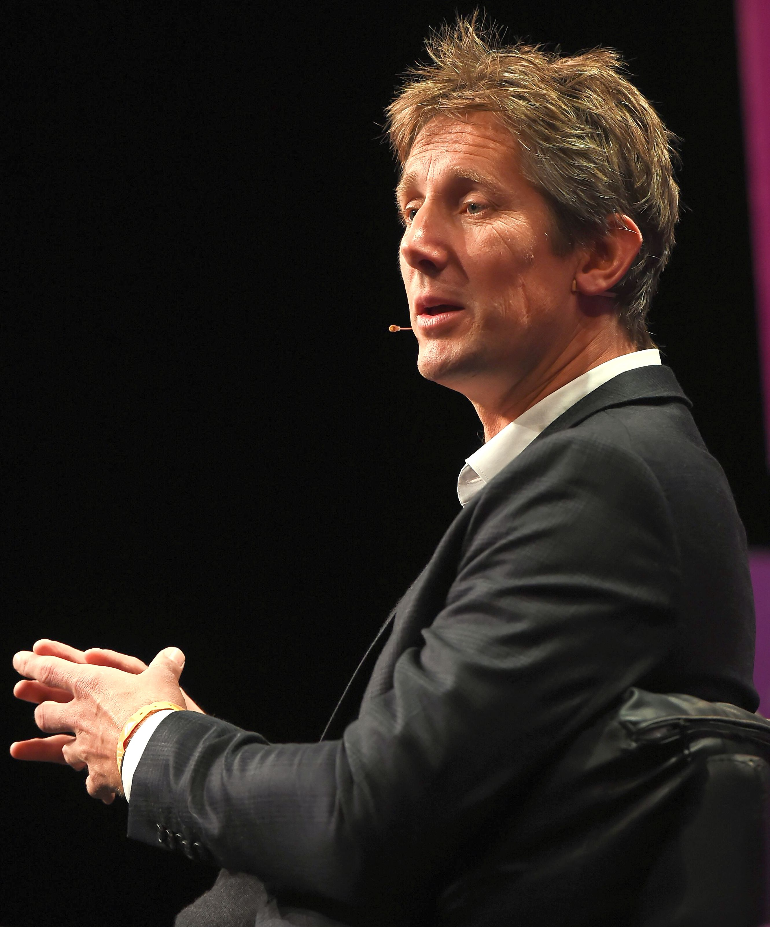 Edwin van der Sar in 2015 at Web Summit (Dublin)